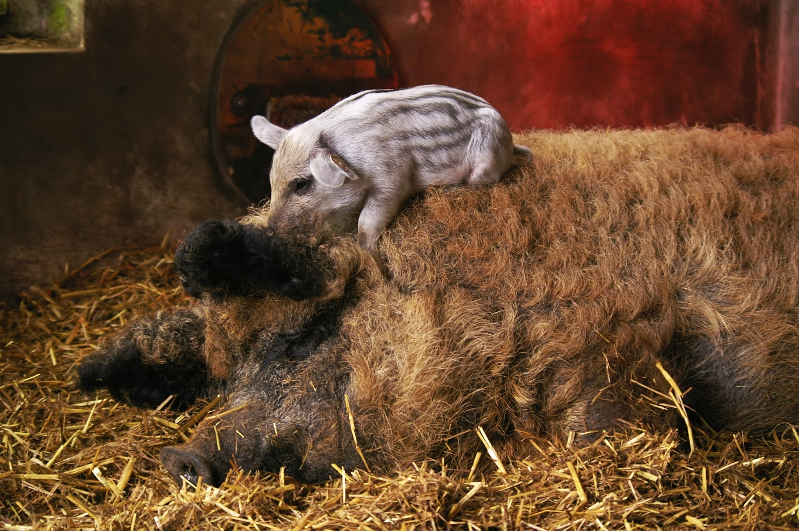 Wollschweinsau mit Ferkel (ca. 1 Monat alt); Emshof im Münsterland. Im Hintergrund der rote Lichtschimmer einer Wärmelampe